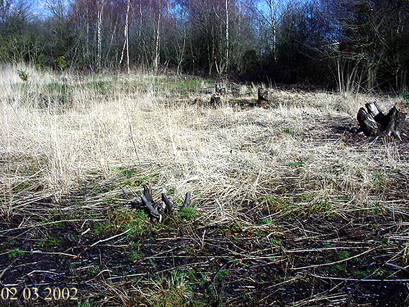 fr photo prise au moment de la décrue en centre ville de Blendecques après l'inondation record de l'Aa (niveau record dépassé de 40 cm), début mars 2002. Au sommet du bassin versant et de la vallée de l'Aa (côté sud), sur les réserves naturelles du Plateau d'Helfaut, le zones humides sont presque sèches (fossés secs le long des routes qui les traversent)